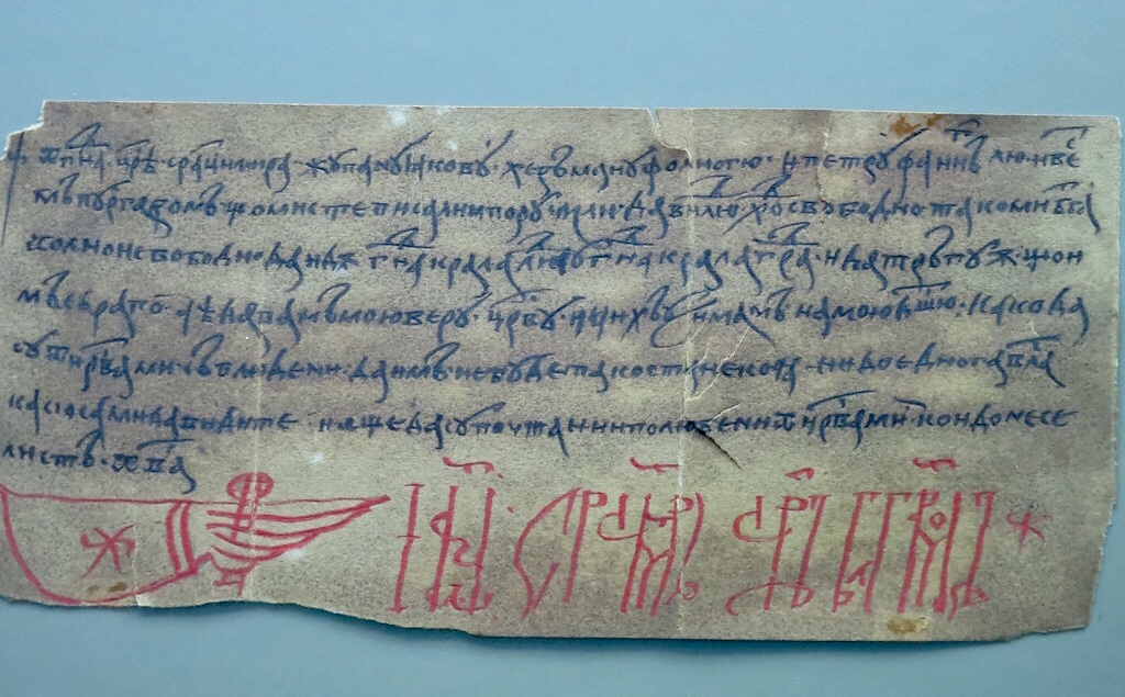 Брашовска грамота на цар Иван Срацимир